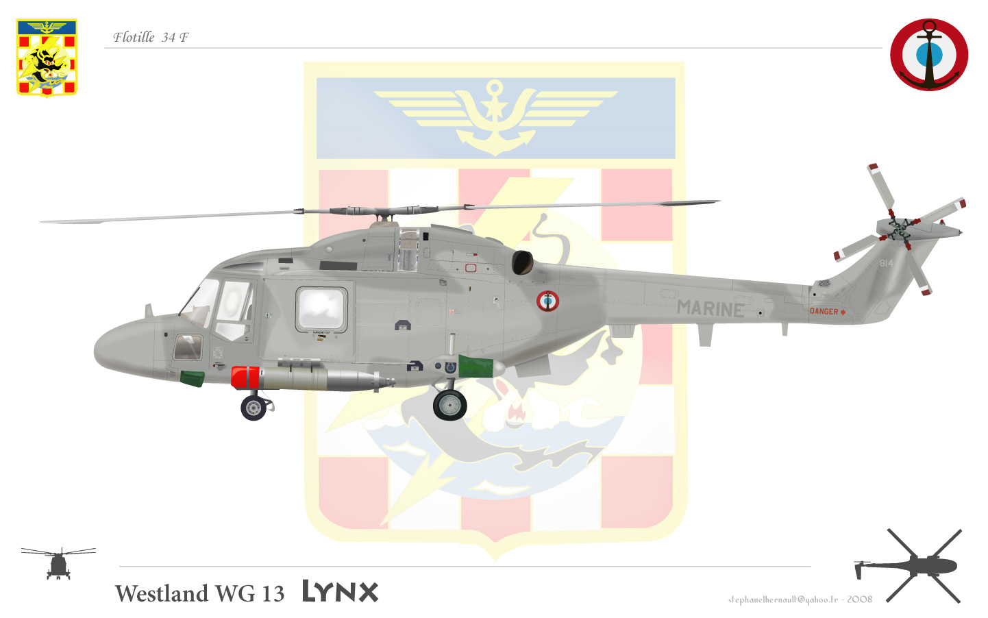 Westland Lynx Flotille 34F